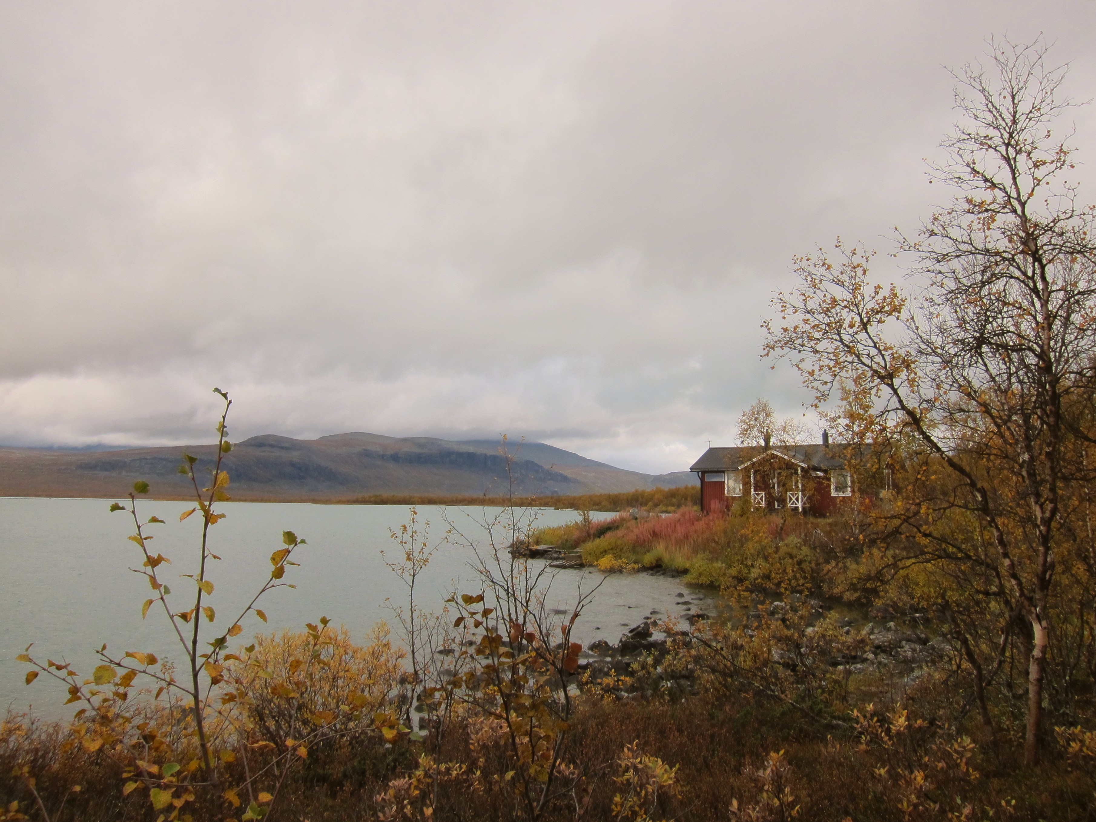 Sjön Sitojaure och stugvärdsboendet vid Sitojaurestugorna.